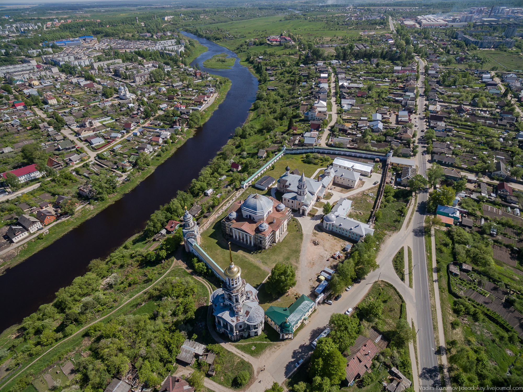 Монастырь Борисоглебский: улица Старицкая, 7, Торжок, Тверская область